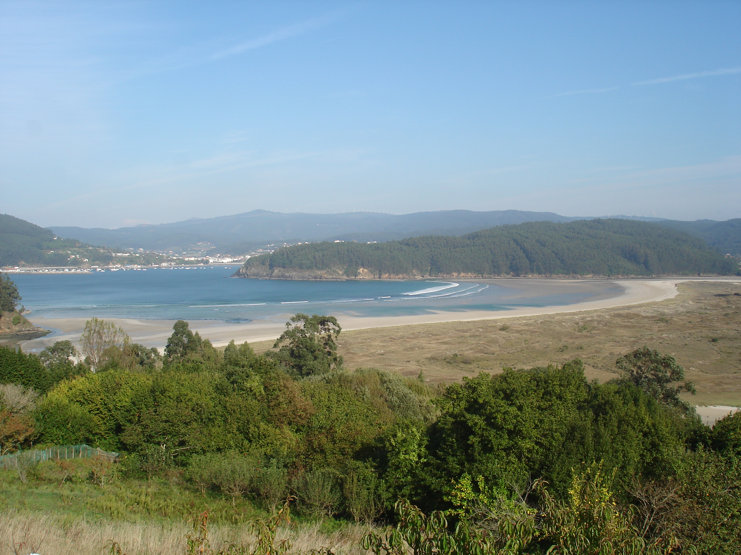 Praia de Vilarrube. Ó fondo pódese albiscar o porto e a vila de Cedeira. Vilarrube Categoría:Imaxes de Vilarrube